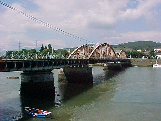 El puente viejo de Colindres (Cantabria).